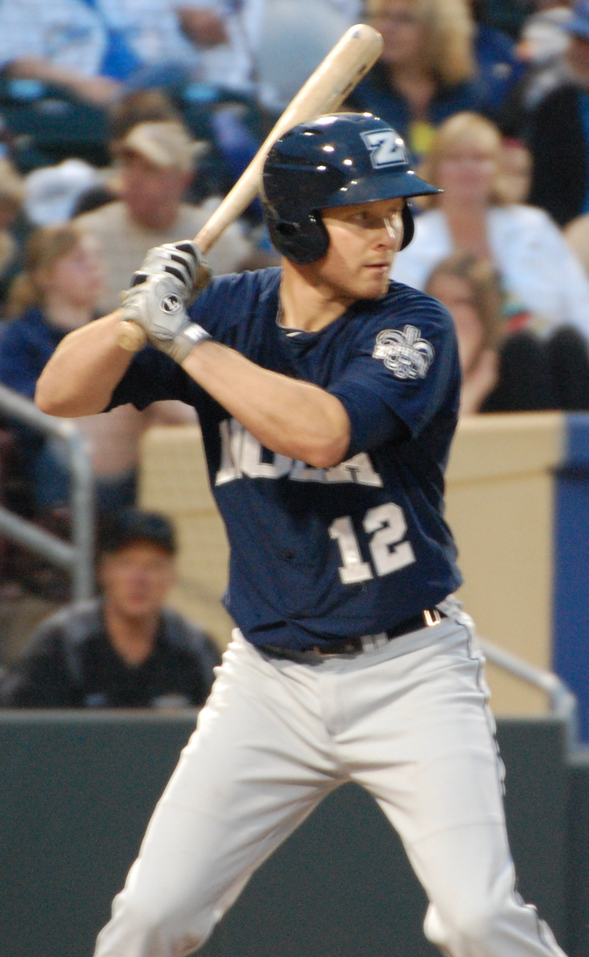 Shawn Bowman